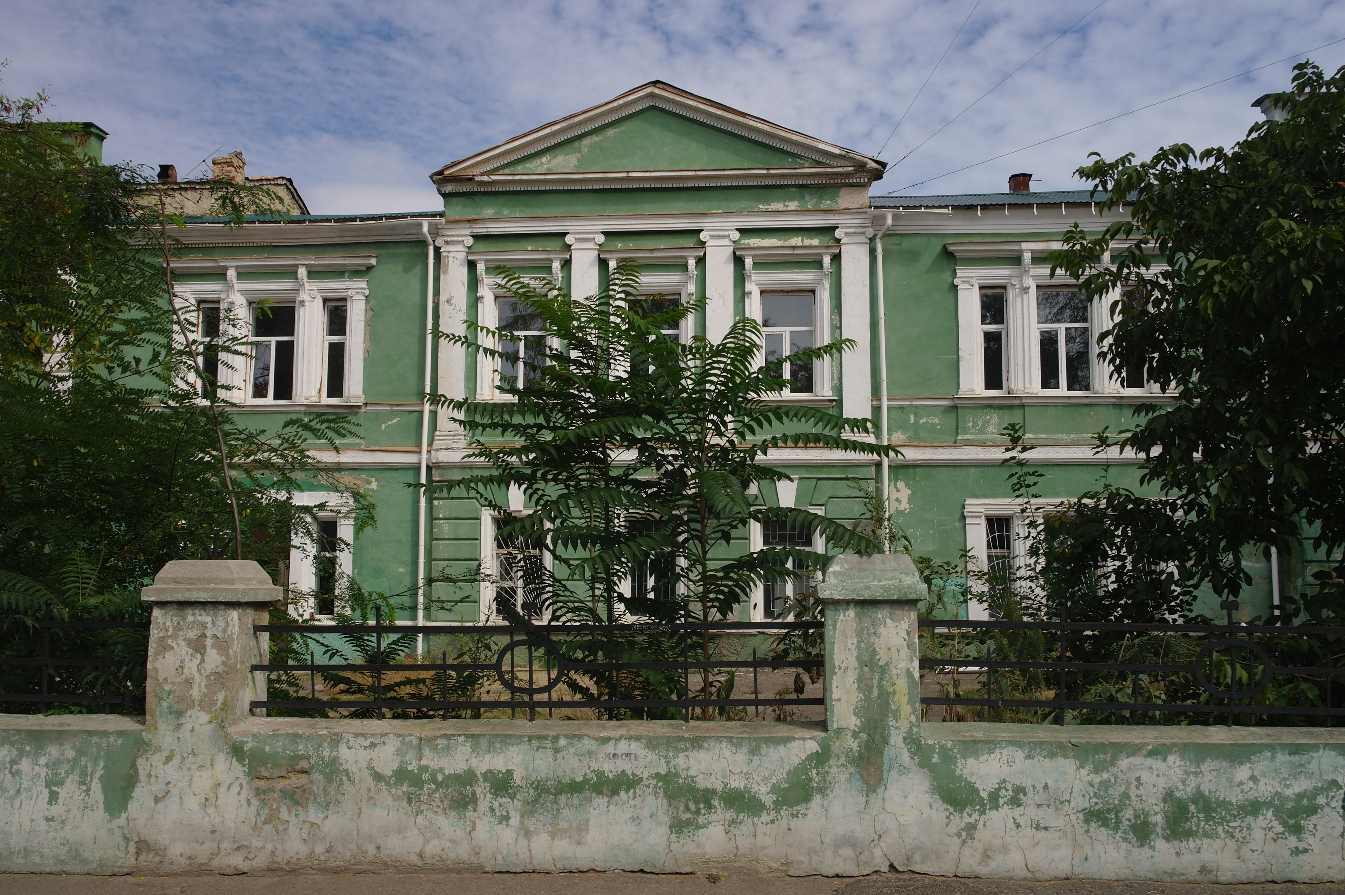 Одеса, Софіївська, 7